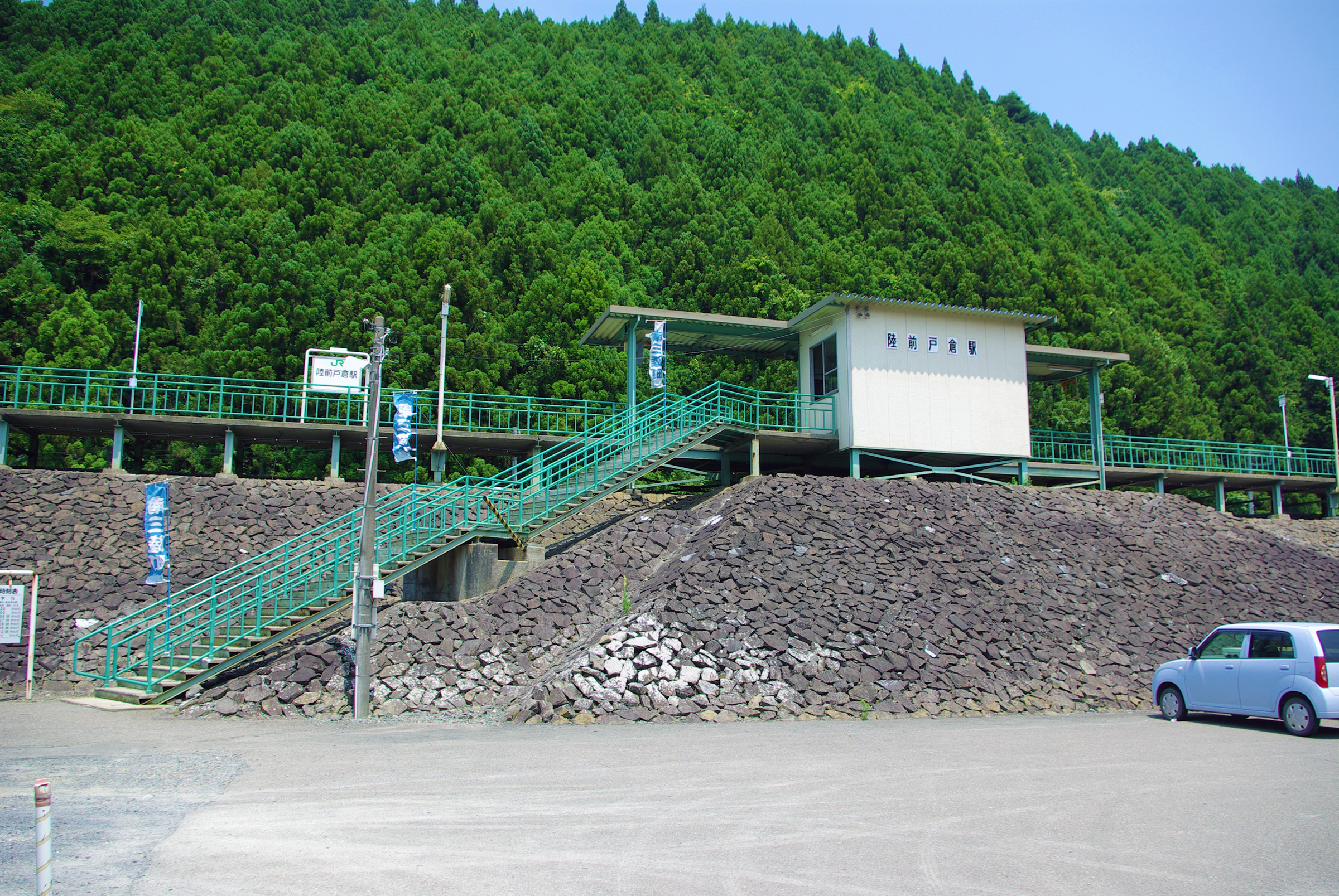 東日本旅客鉄道気仙沼線陸前戸倉駅 東日本大震災前の様子（駅入口ほか